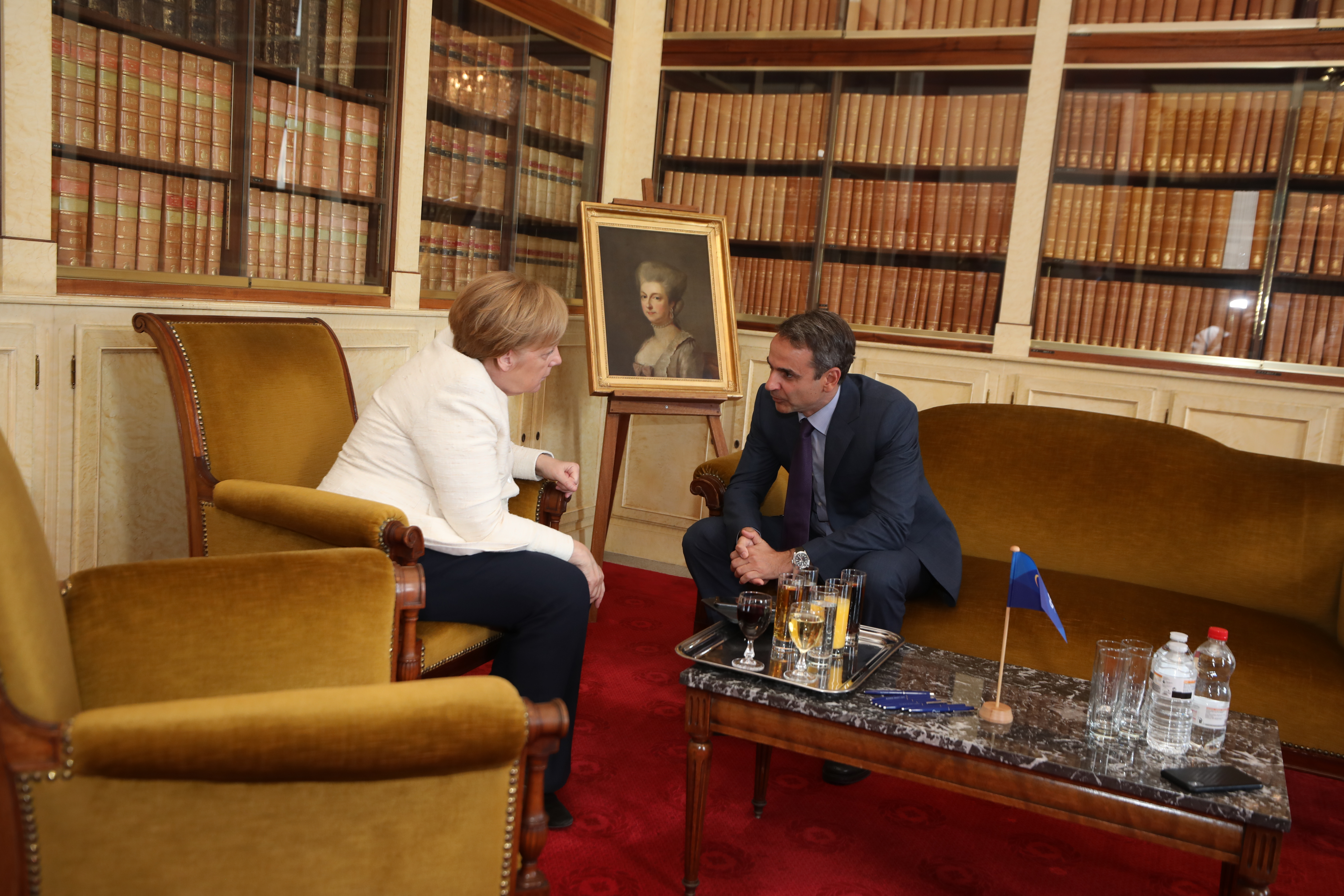 EPP Summit, 20 June 2019